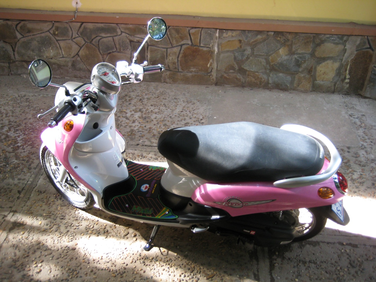 Yamaha Fino